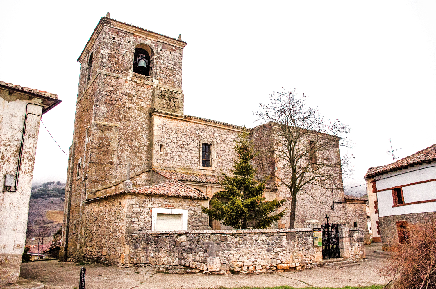 Iglesia de San Ana, de Cuevas de Amaya (España)